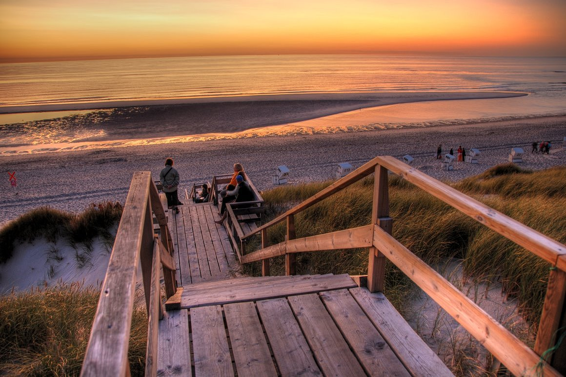 Strand bei Klappholttal, Sylt